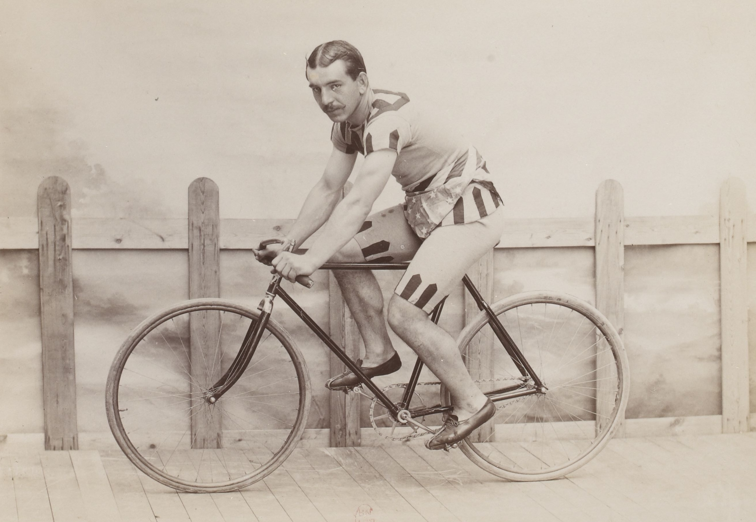 [Collection Jules Beau. Photographie sportive] : T. 6. Année 1898 / Jules Beau : F. 32v. Robl, Allemand ; Miller